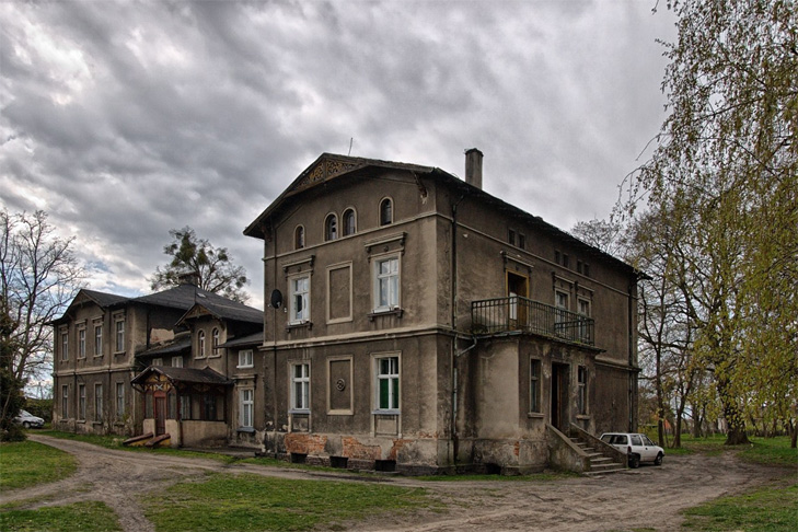 Zbrudzewo Dwór Skrzydlewskich